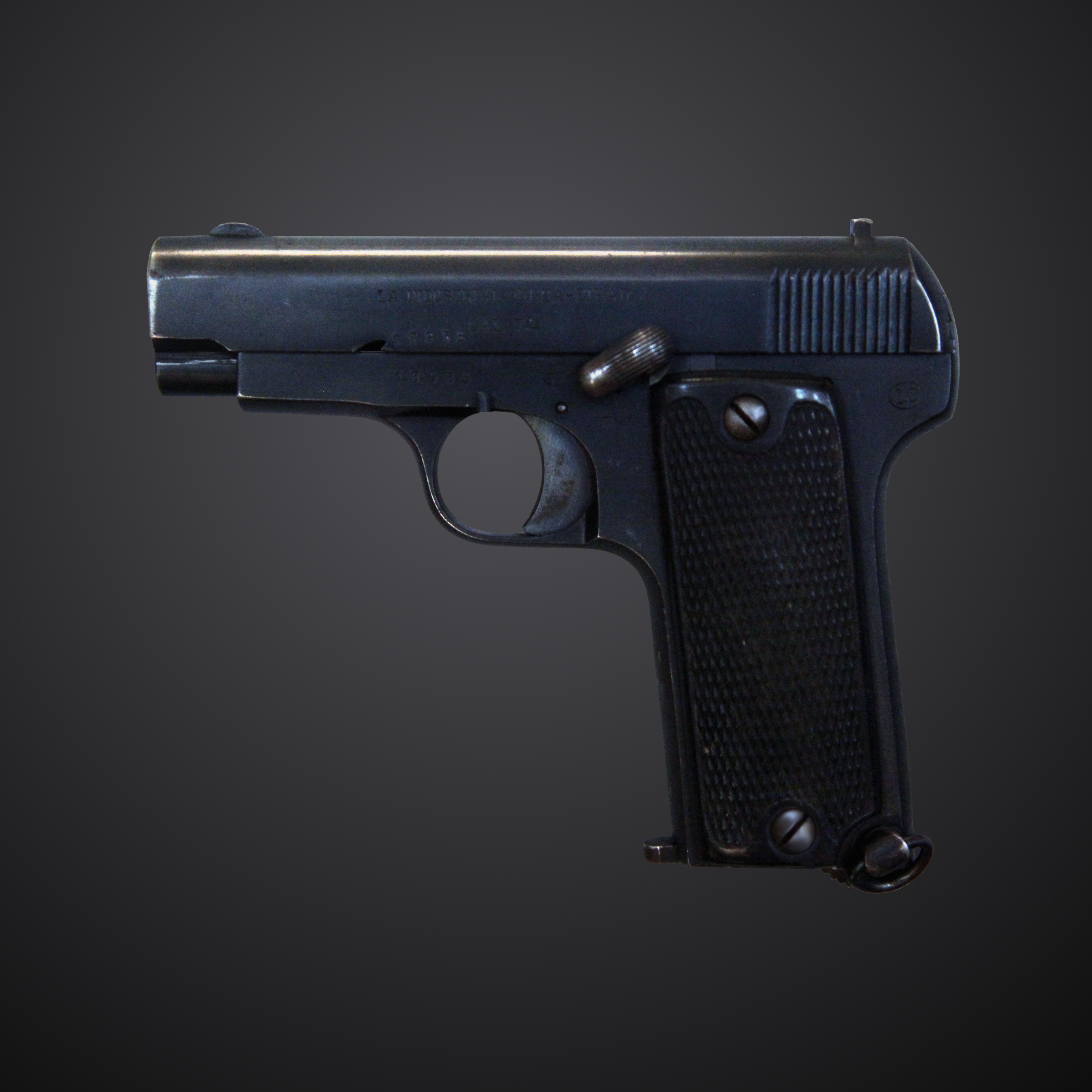 Ruby pistol, France, 1914. On display at Musée de l'Armée (Inv. 2001.45.1)